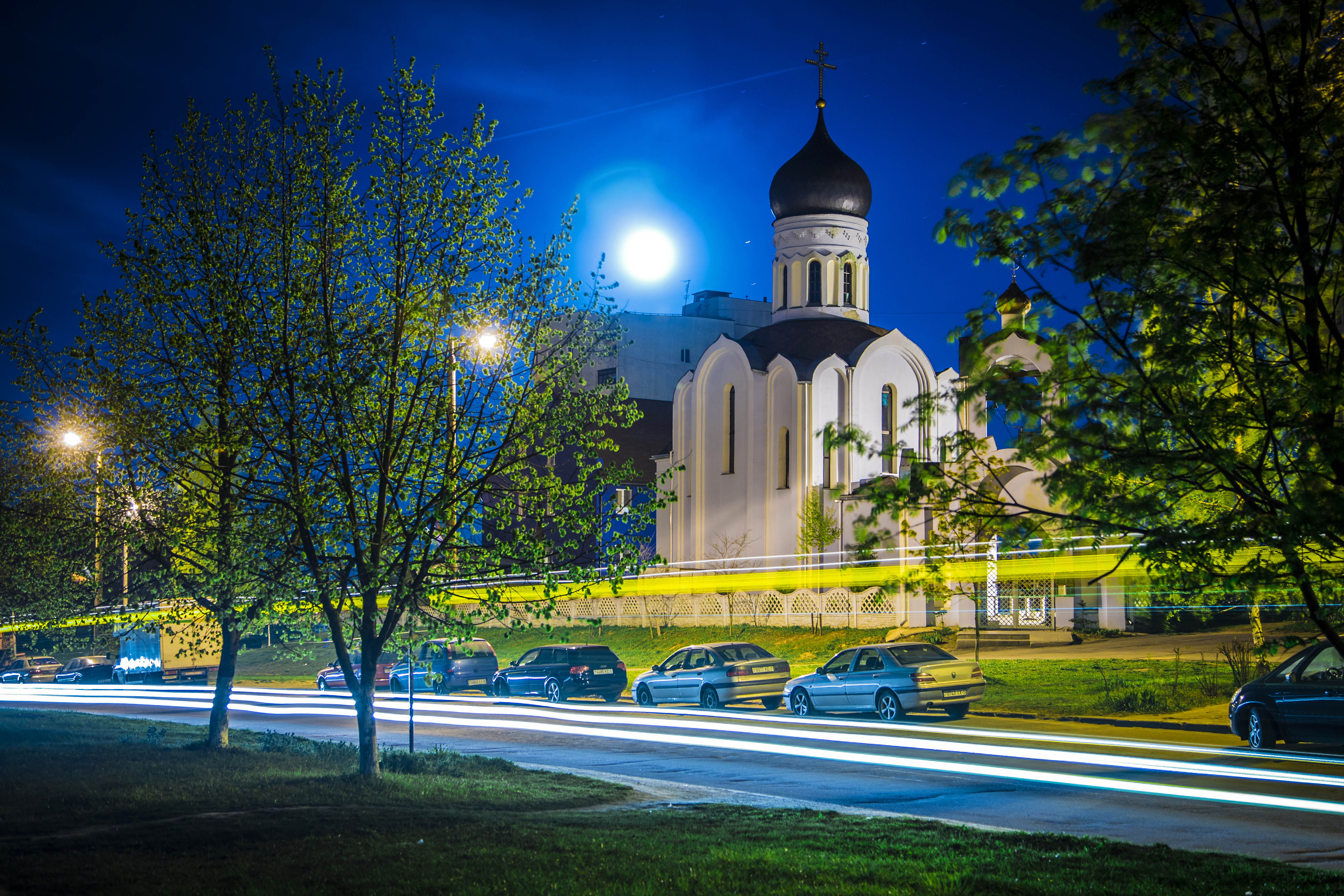 Храм Святого Духа в Гатово. Свято-Духовская церковь Минской епархии Белорусского экзархата Московского патриархата